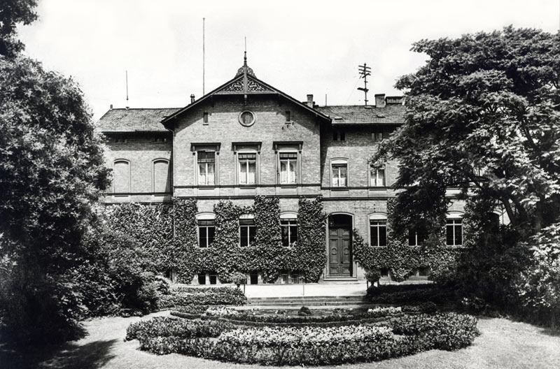 Historische Ansicht Hauptgebäude Forschungsanstalt Geisenheim, ca. 1890